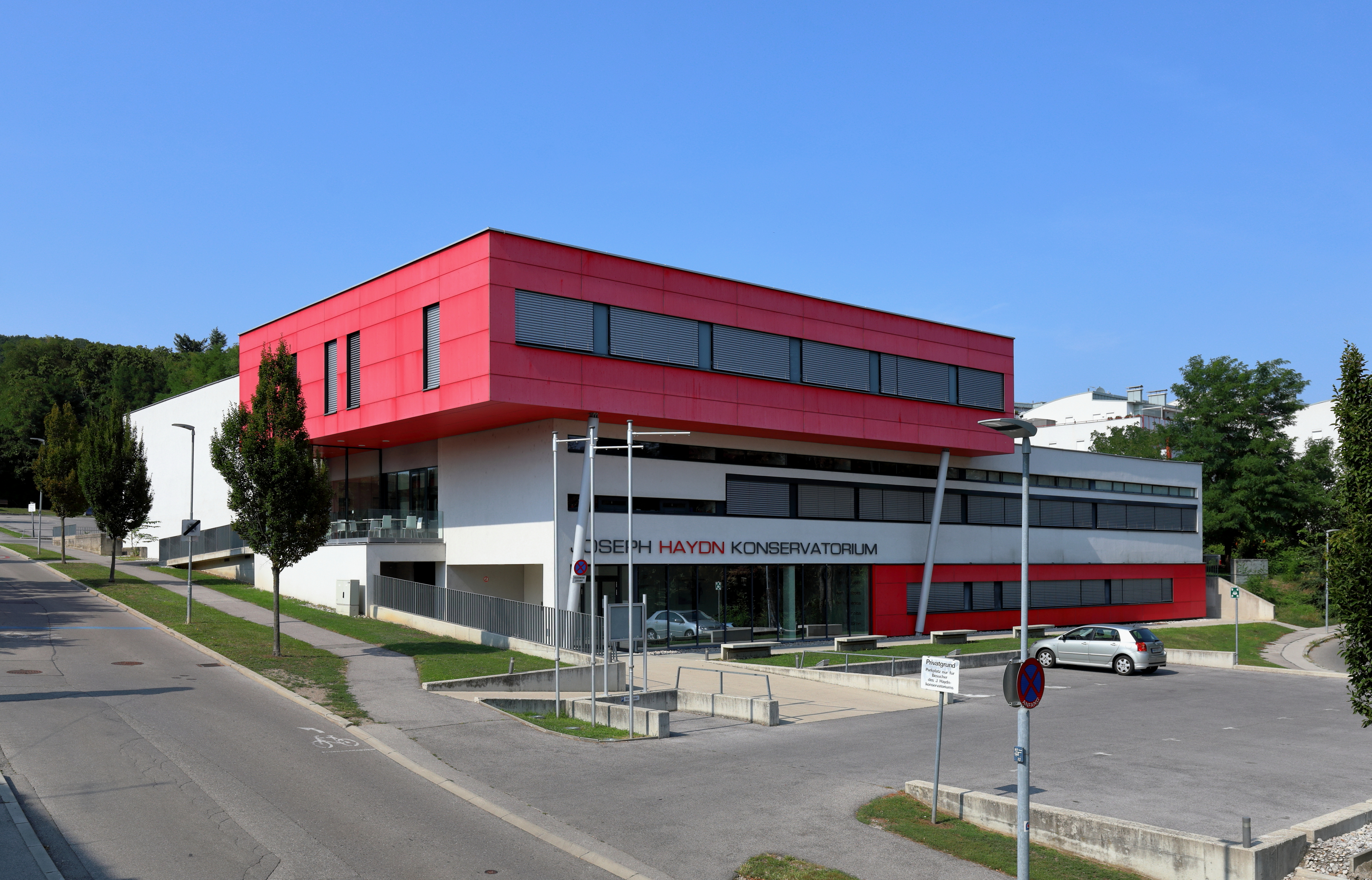 Südansicht des Joseph-Haydn-Konservatorium in der burgenländischen Hauptstadt Eisenstadt.Nach Beschluss der burgenländischen Regierung 1961 eine Landesmusikschule zu errichten, erfolgte 1966 der Spatenstich. Am 15. Oktober 1970 fand die Inbetriebnahme des Baues, der nach Plänen der Architekten Gottfried Fickl und Matthias Szauer errichtet wurde und rd. 15 Mio. Schilling kostete, statt. 1971 erfolgte die Umbenennung in Joseph-Haydn-Konservatorium des Landes Burgenland. Ab 2007 wurde das Gebäude unter der Regie des Architektenbüros Rudischer & Panzenböck generalsaniert, durch Zubauten erweitert und mit einem Festakt am 9. April 2008 abgeschlossen.